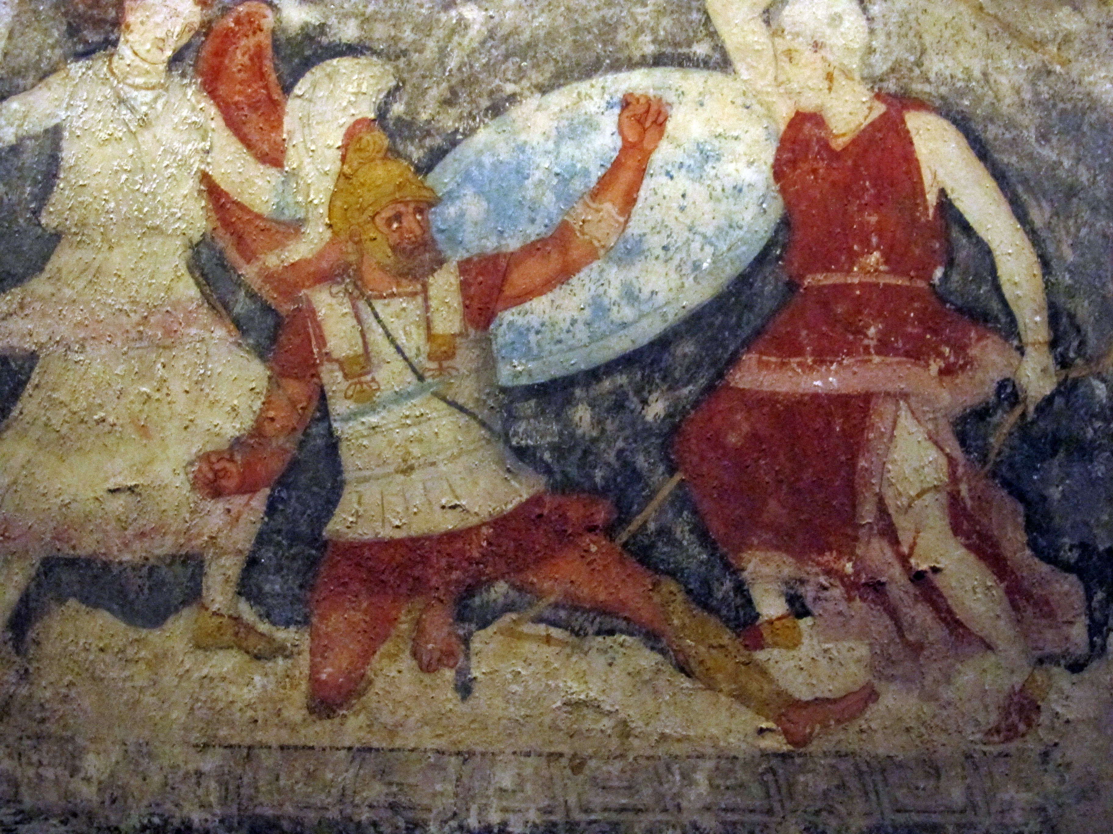 Sarcofago delle Amazzoni